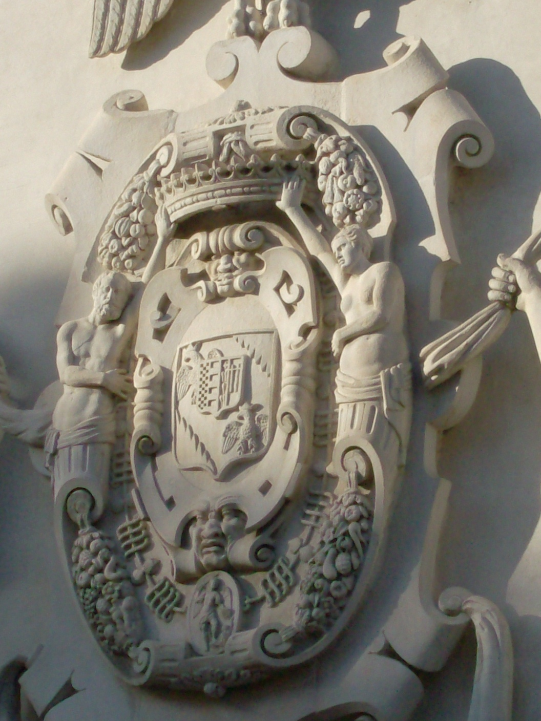 Il Palazzo Bentivoglio a Ferrara in via Garibaldi